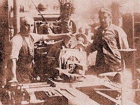 Zenón Díaz y Octavio J. Díaz en los talleres.